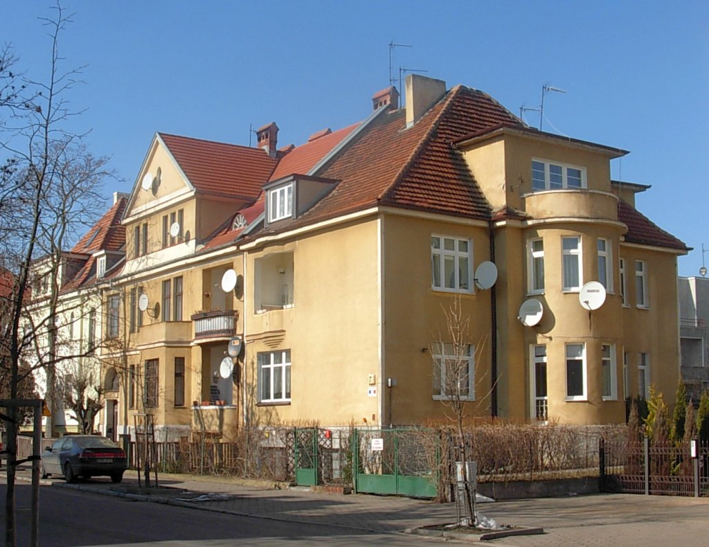 Osiedle Sielanka w Bydgoszczy, dom ul. Mikołaja Kopernika 7 (1933-1935, budowniczy Bolesław Polakiewicz)